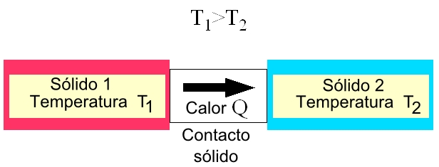 Français Schéma de transfert de chaleur par conduction. *English Heat transfert by conduction